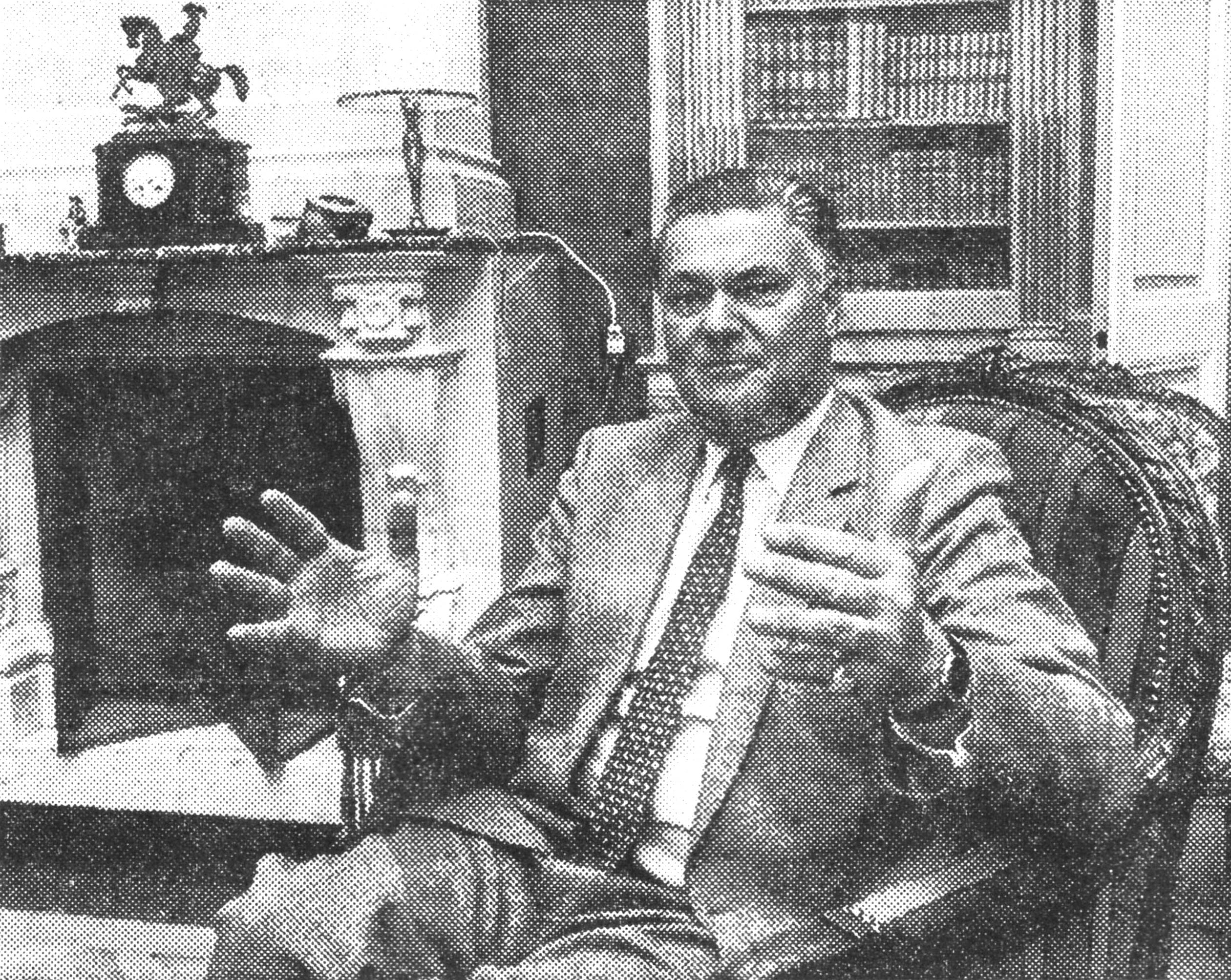 Yann Richter, 21. Präsident der Freisinnig-Demokratischen Partei der Schweiz (FDP, 1978-1984)